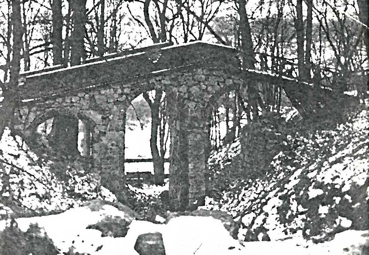 Klein-Glienicke, Teufelsbrücke 1934 verfremdet